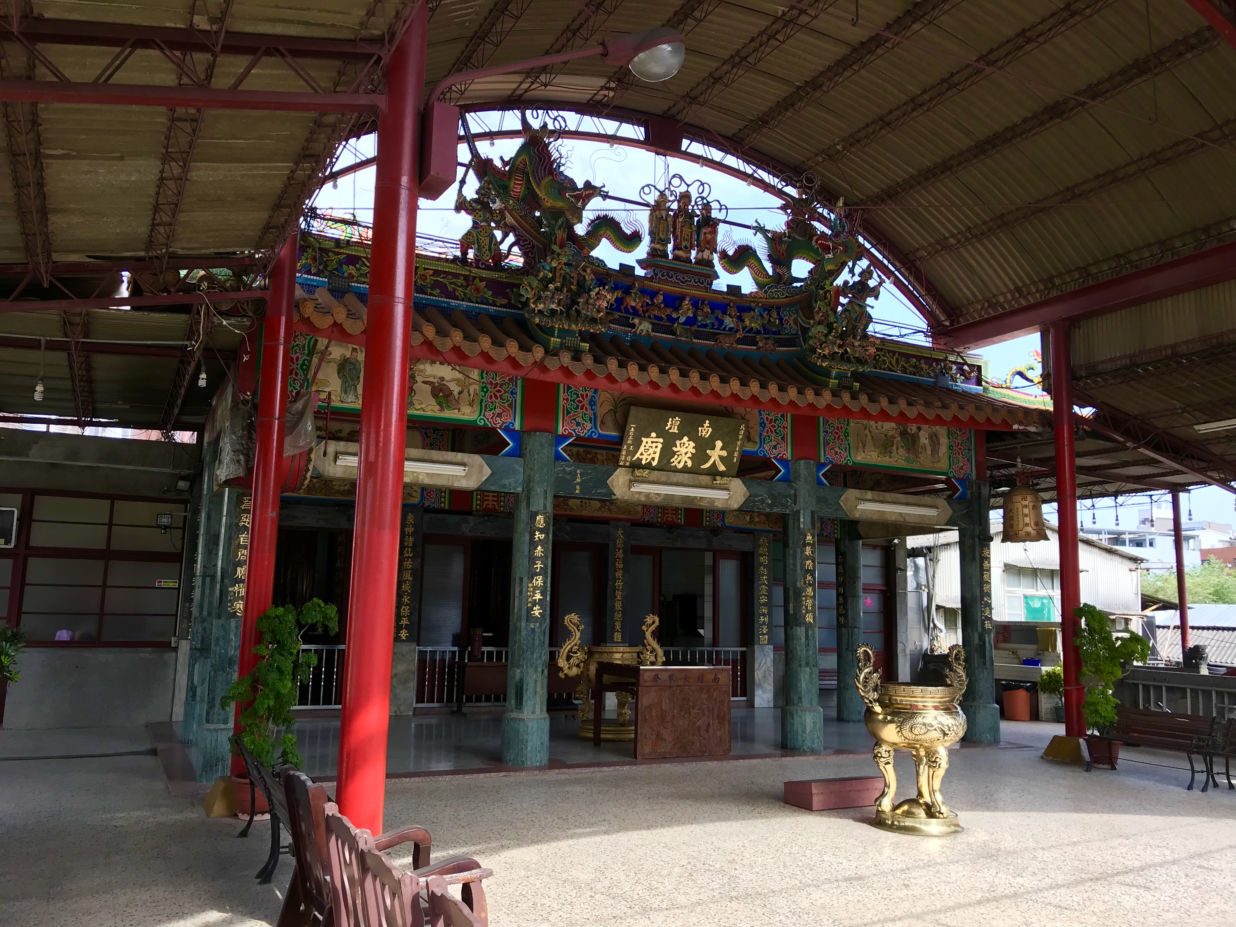 南壇大眾廟二樓